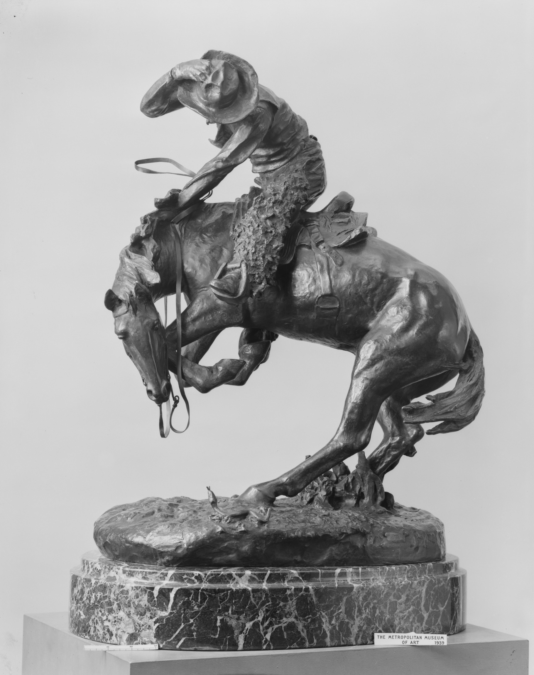 Sculpture; Sculpture